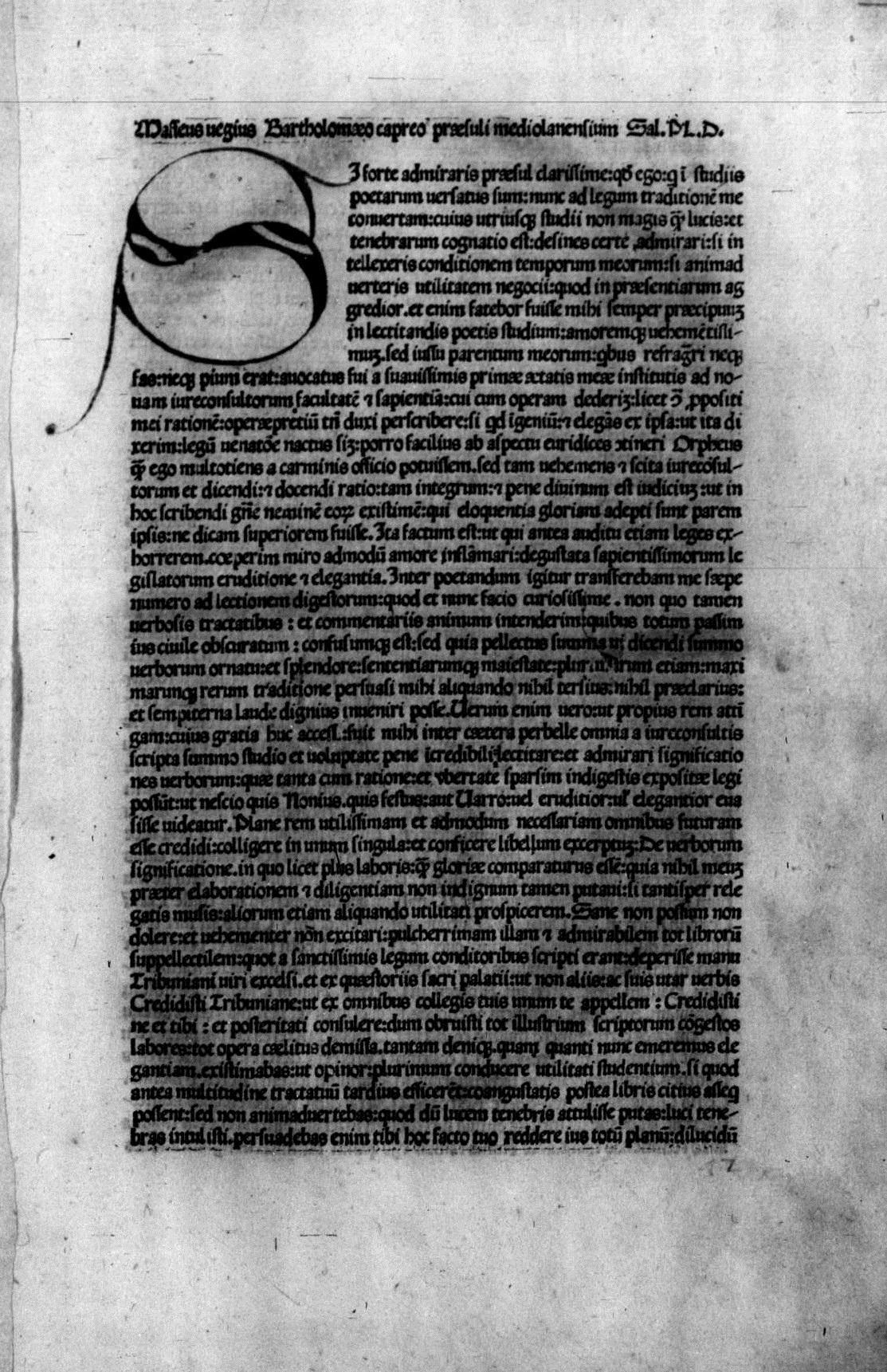 Carta